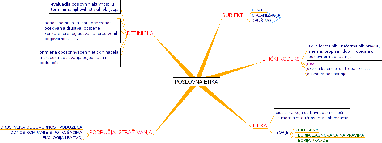 Poslovna etika